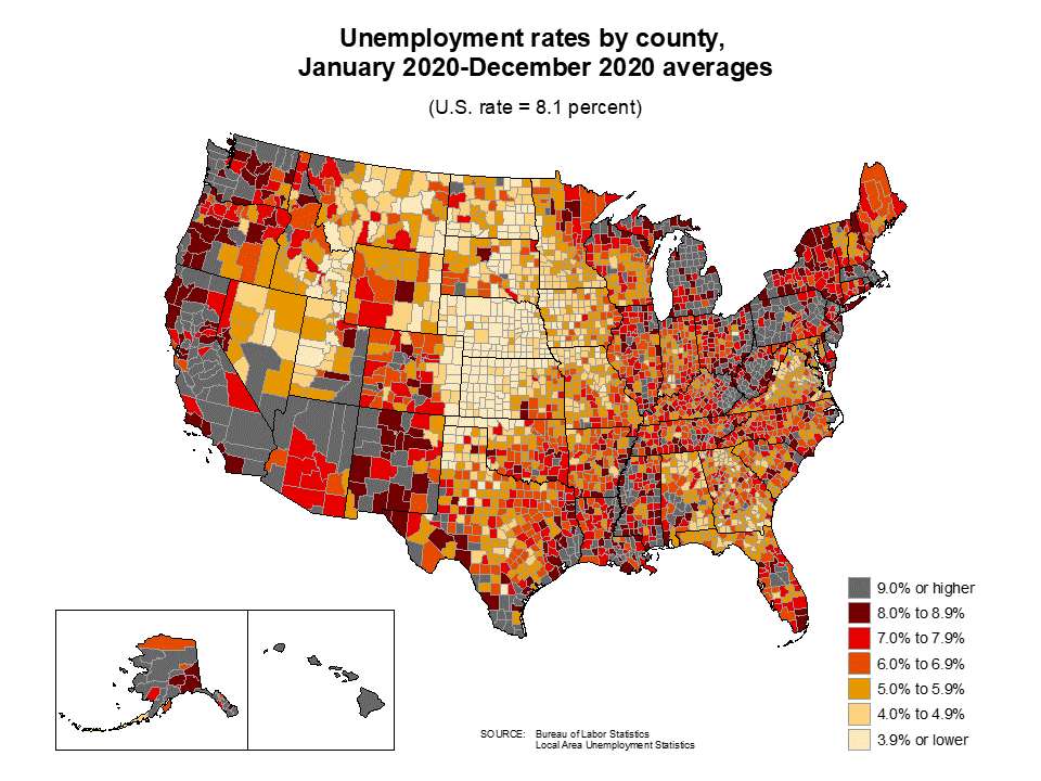 アメリカ合衆国国内の失業率（2018年11月～2019年10月の間の平均）